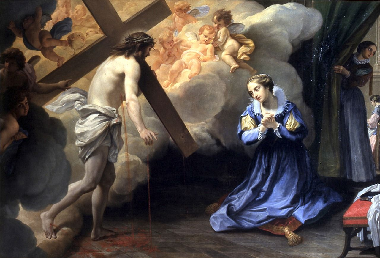 La visión de santa Catalina Fieschi Adorno.